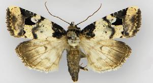 Bryolymnia poasia female